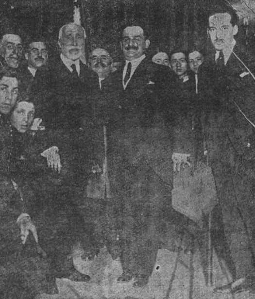 El señor Goicoechea con el señor Maura y otros caracterizados personajes del partido, después de la notable conferencia que dió anoche en el Palace Hotel. (Fot. Goñi.)